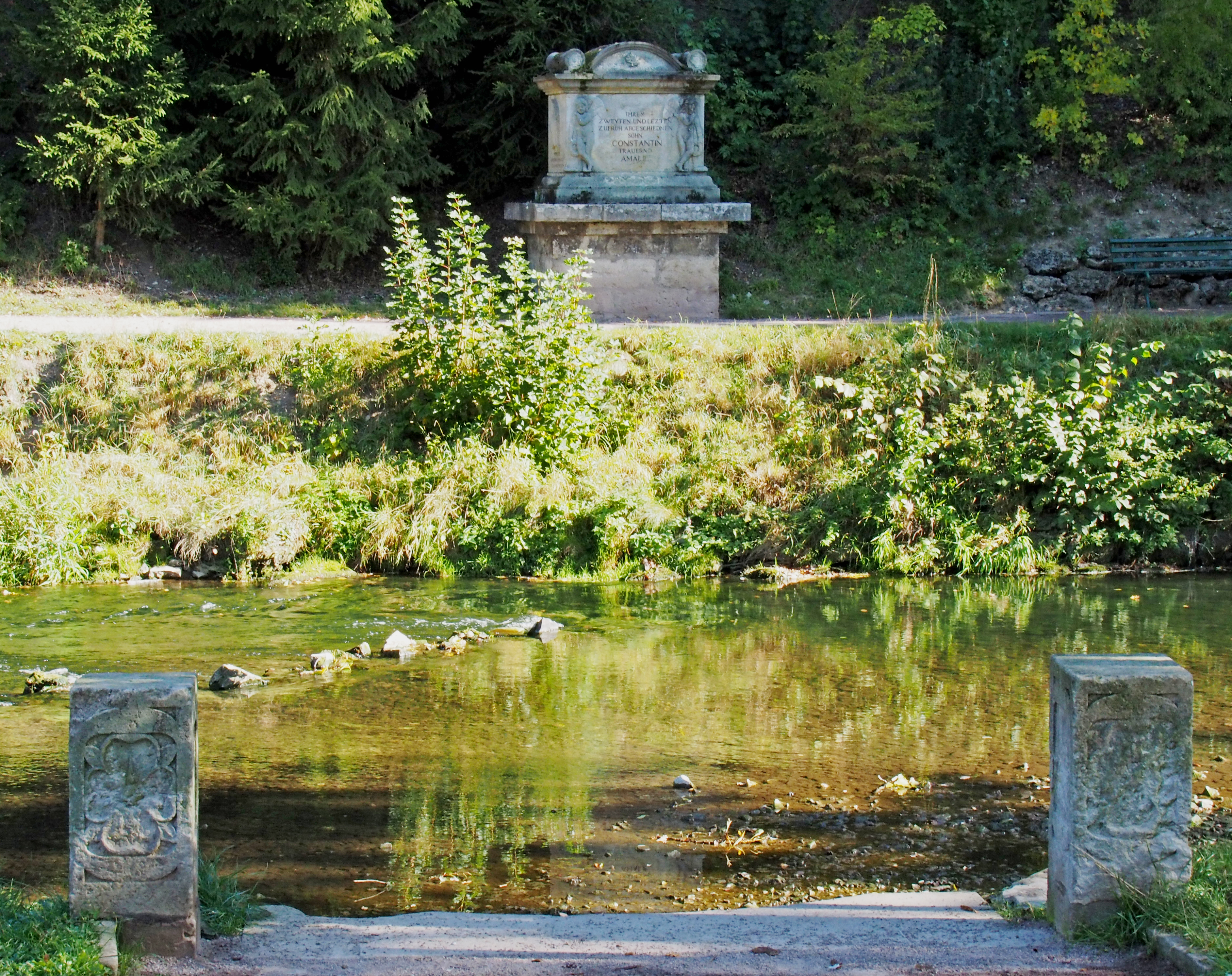 Denkmal für Prince Frederick Ferdinand Constantin of Saxe-Weimar-Eisenach im Schlosspark Tiefurt